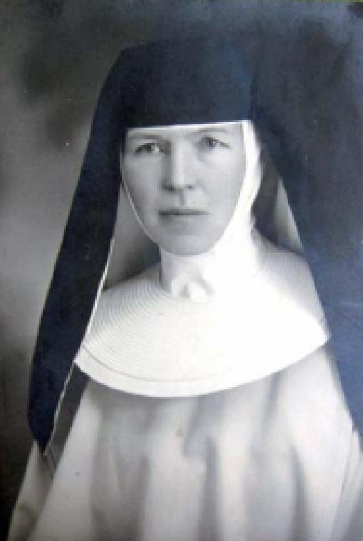 Marie Filomena Dolanská, česká učitelka a řeholnice